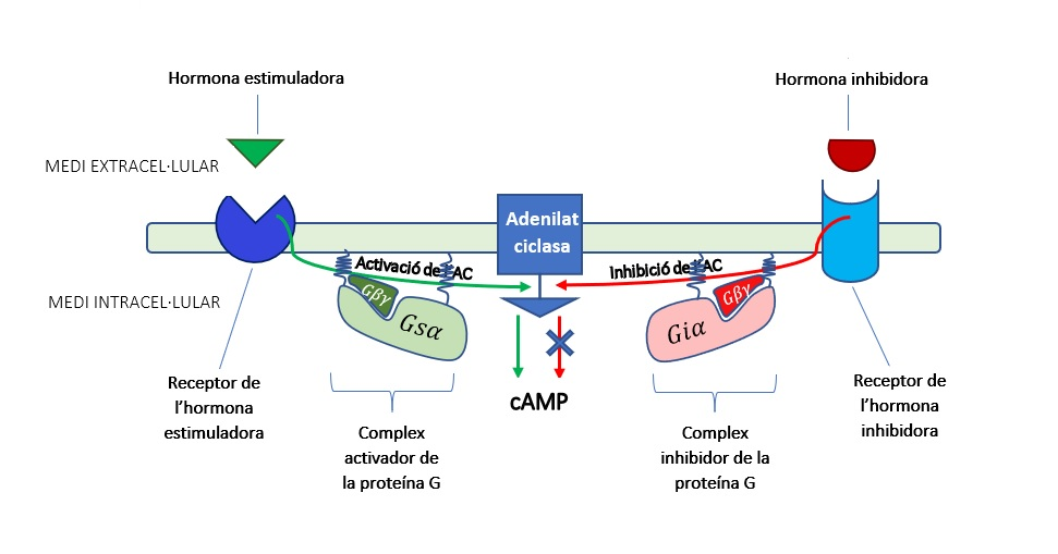 Representació gràfica del procès general de regulació (inhibició i activació) de l'Adenilat ciclasa a la cèl·lula.